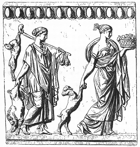 drei Horen